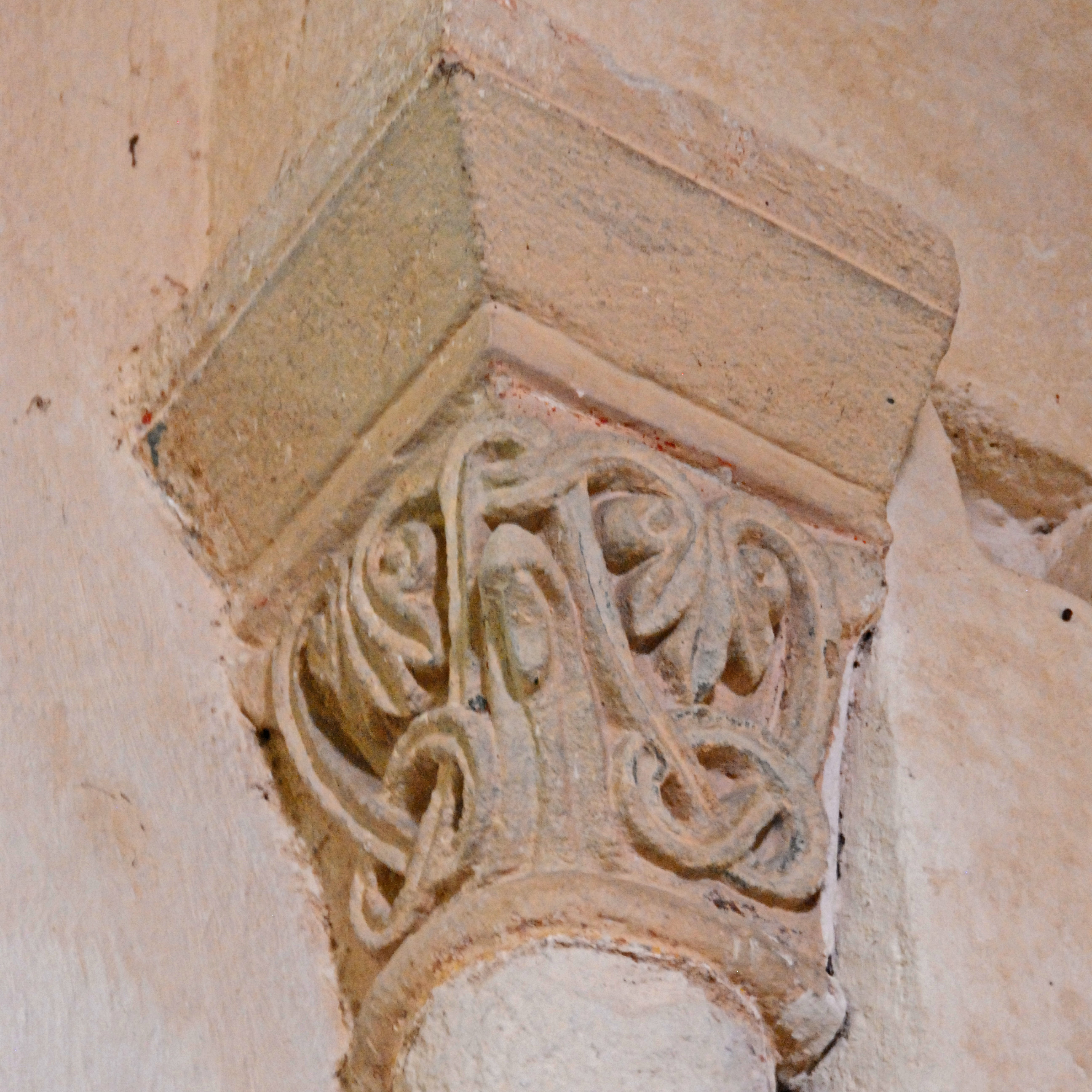 St.-Jean Glaine-Montaigut; Kapitell, Pflanzenranken